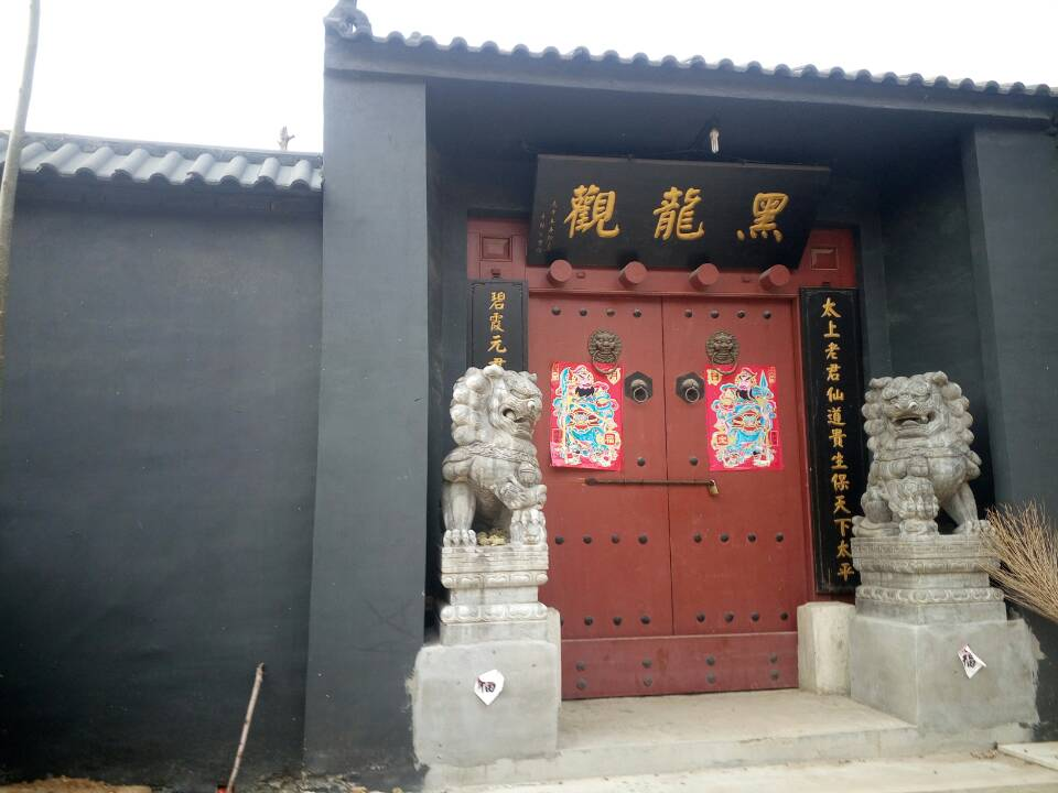 大羊镇丁坞村